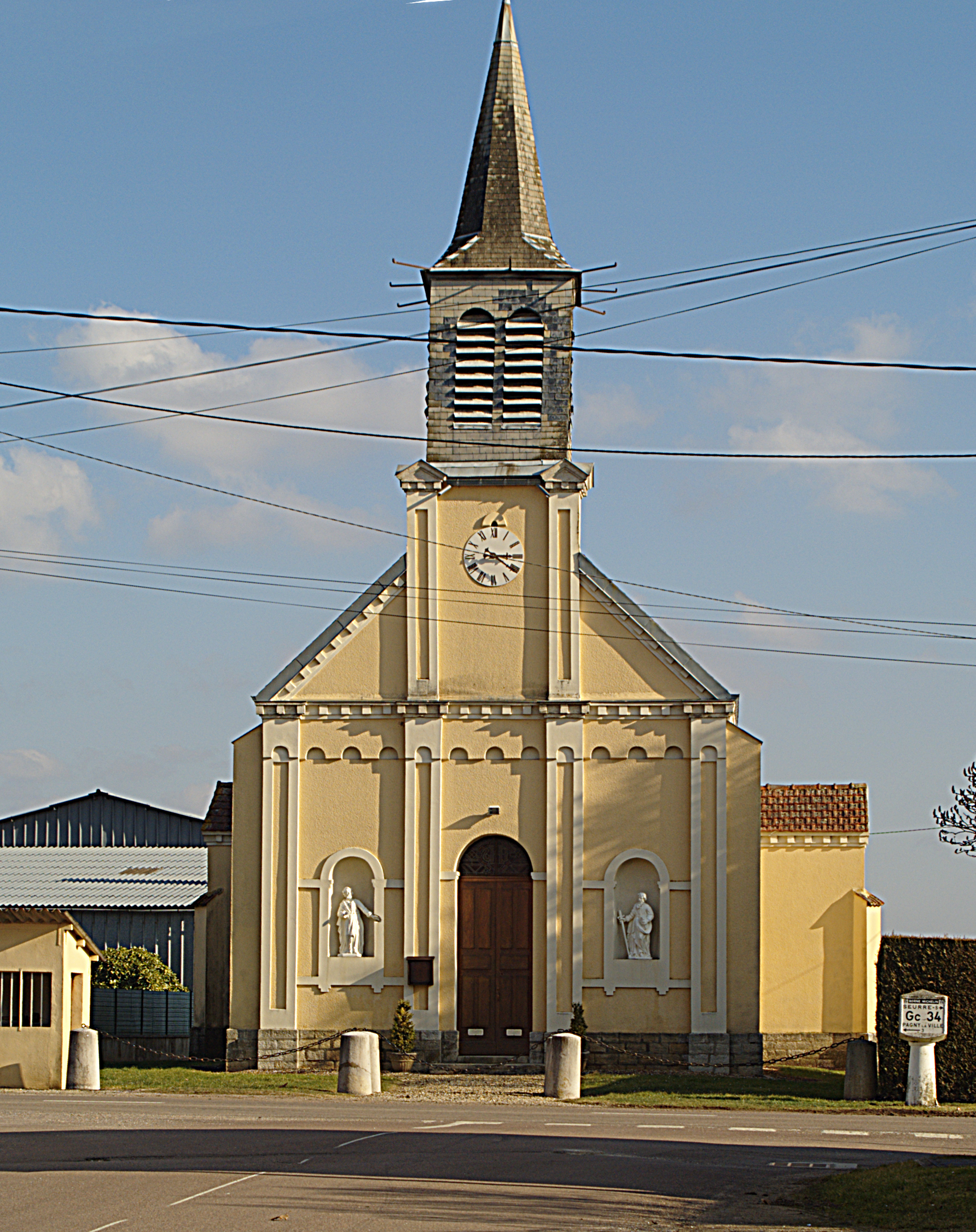 Église Saint-Sébastien, Labruyère (Côte d'Or, Bourgogne, France)